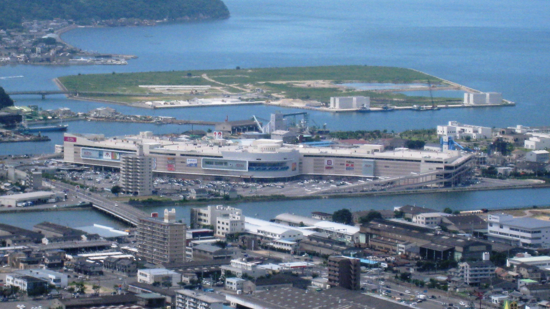 香川県高松市石清尾山から眺めたイオン高松ショッピングセンターの全景